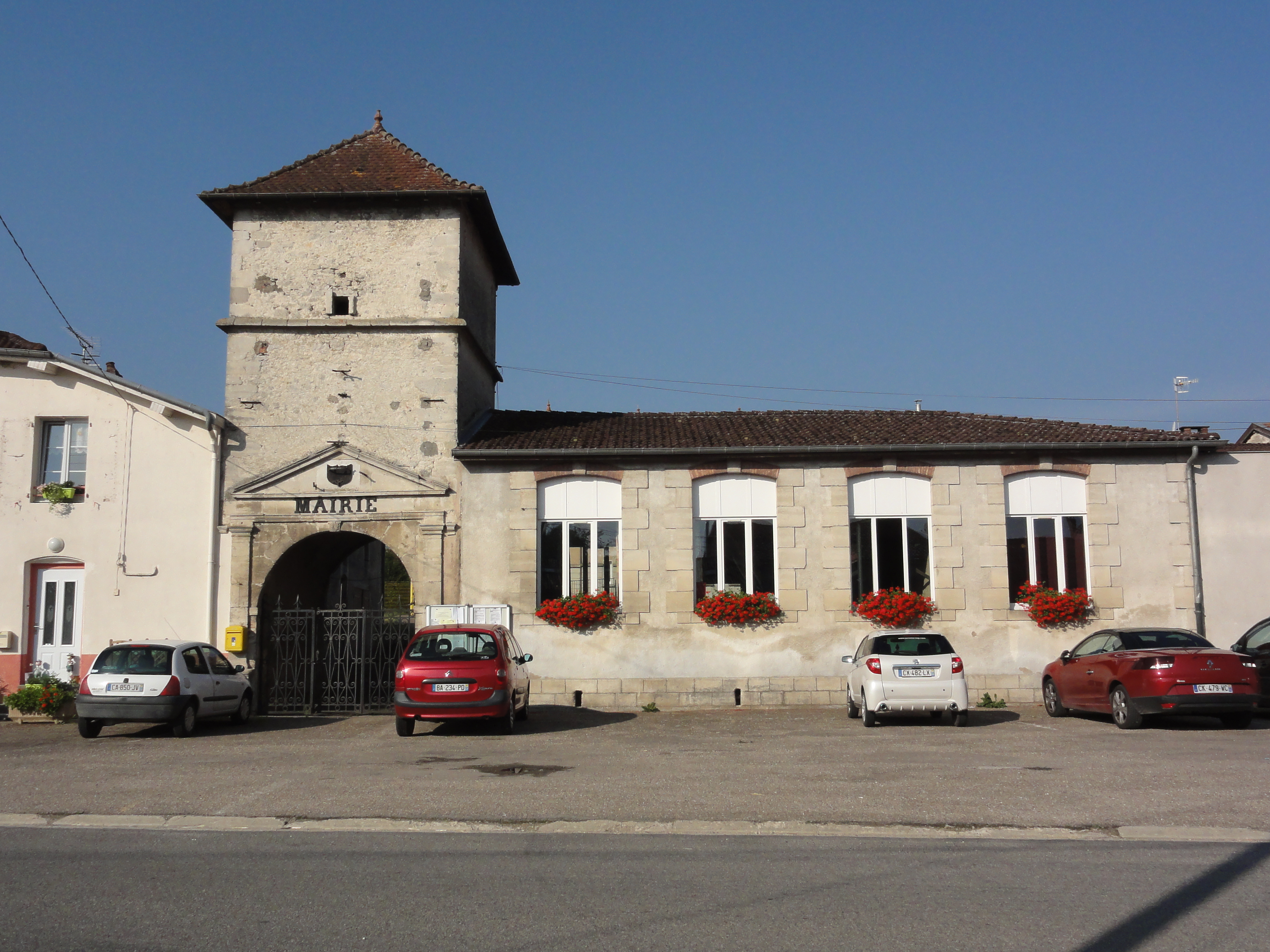 Les Monthairons (Meuse) mairie